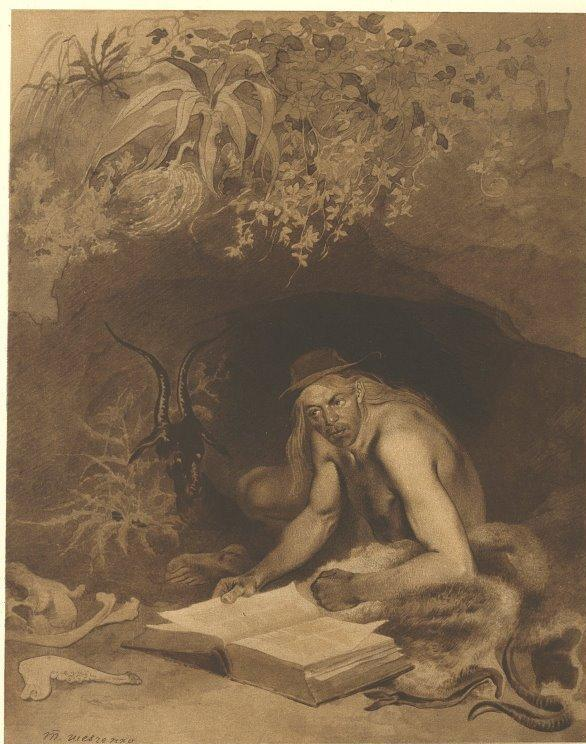 Робінзон Крузо, малюнок Т.Г.Шевченка (1814-1861). Папір, сепія, бістр (24,2 × 19,3). [Новопетровське укріплення], літо 1856 року